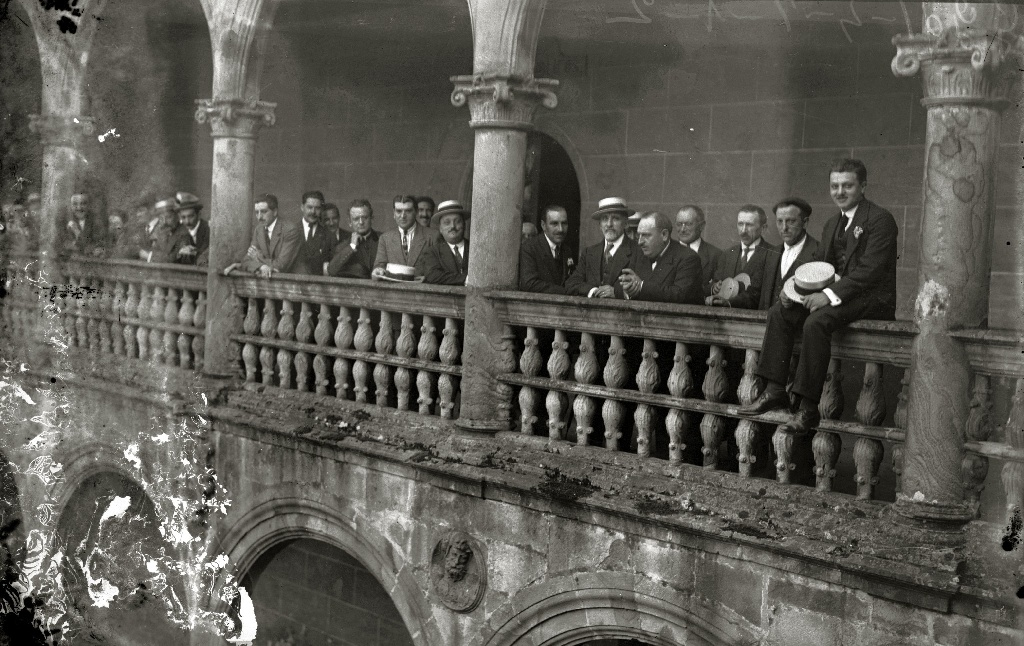 Título original: Grupo de hombres en la Universidad de Oñati (1/1) Localización: Oñate (Guipúzcoa)